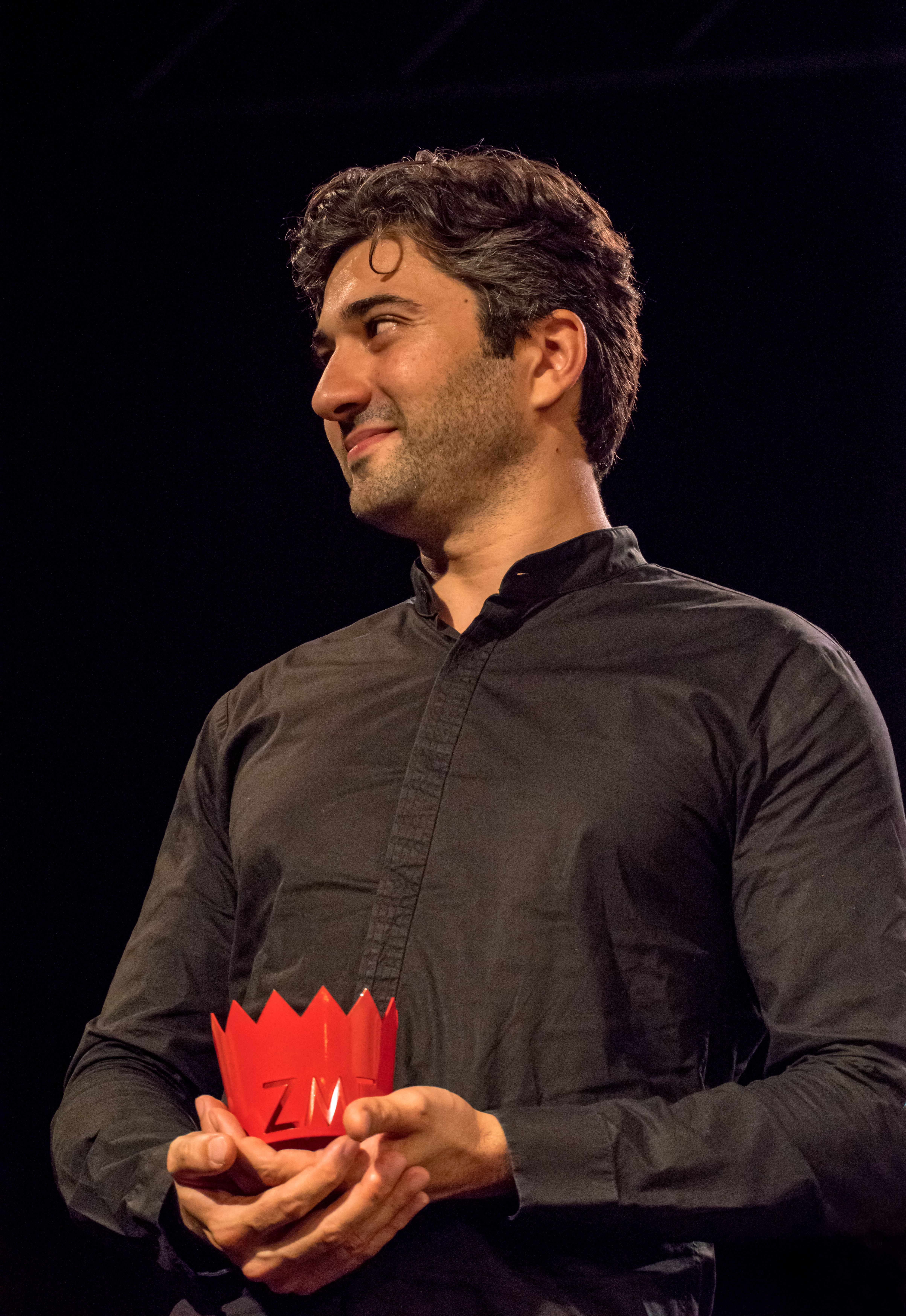 Bilder vom Zelt Musik Festival 2016 in Freiburg im Breisgau Die Preisverleihung uf der Gala